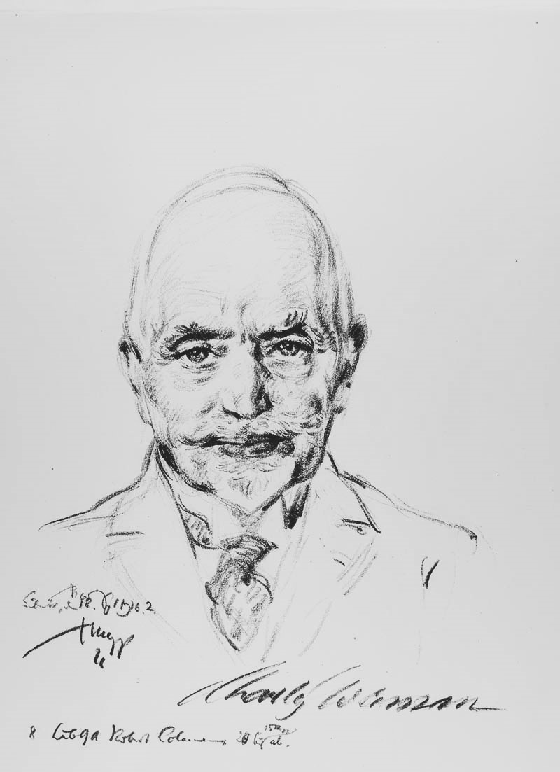 Charles Coleman (1852–1936), Verleger und Gründer des Lübecker Generalanzeigers, Vorläufer der Lübecker Nachrichten. Zeichnung von Emil Stumpp.